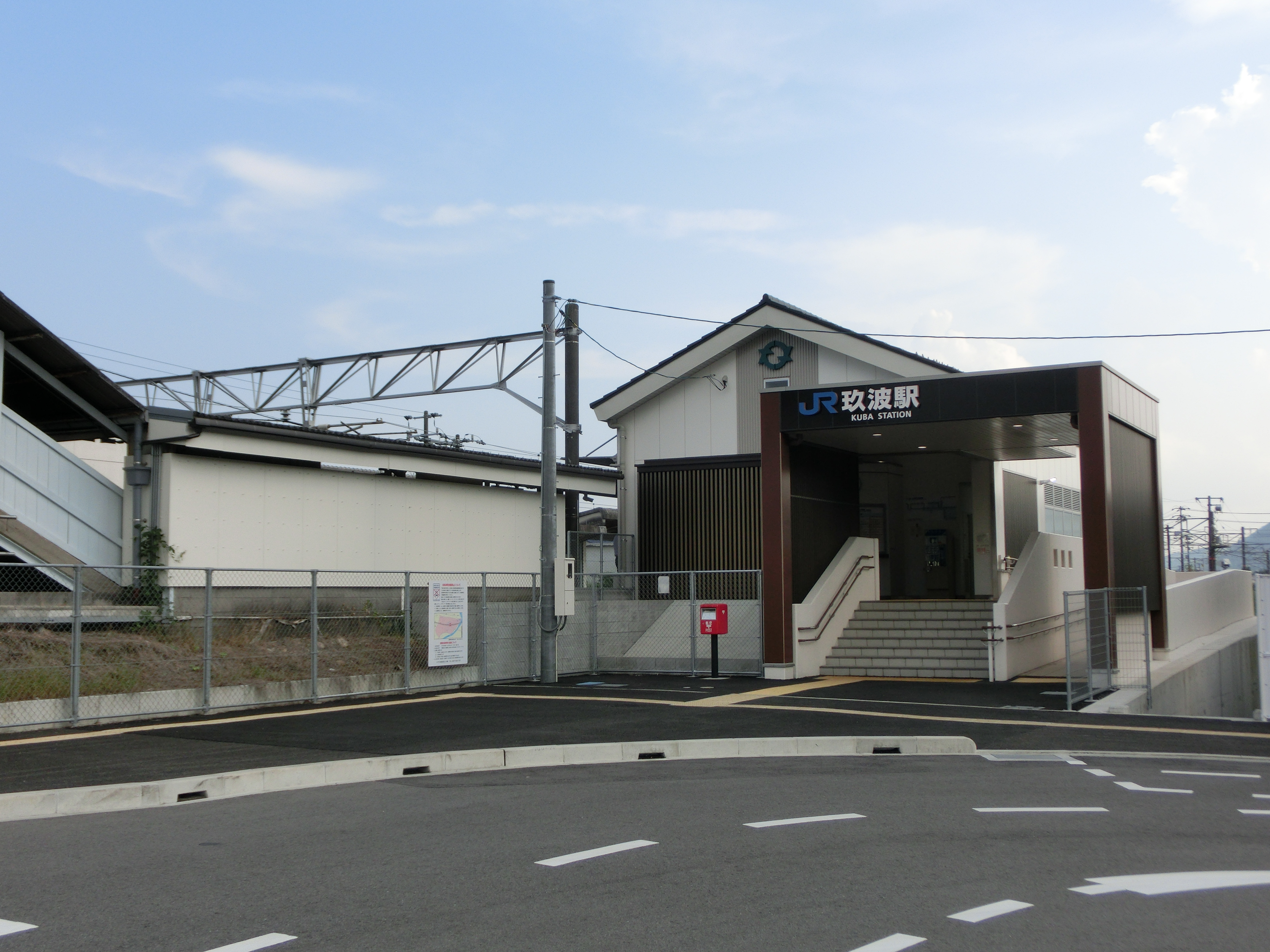 2016年9月6日撮影